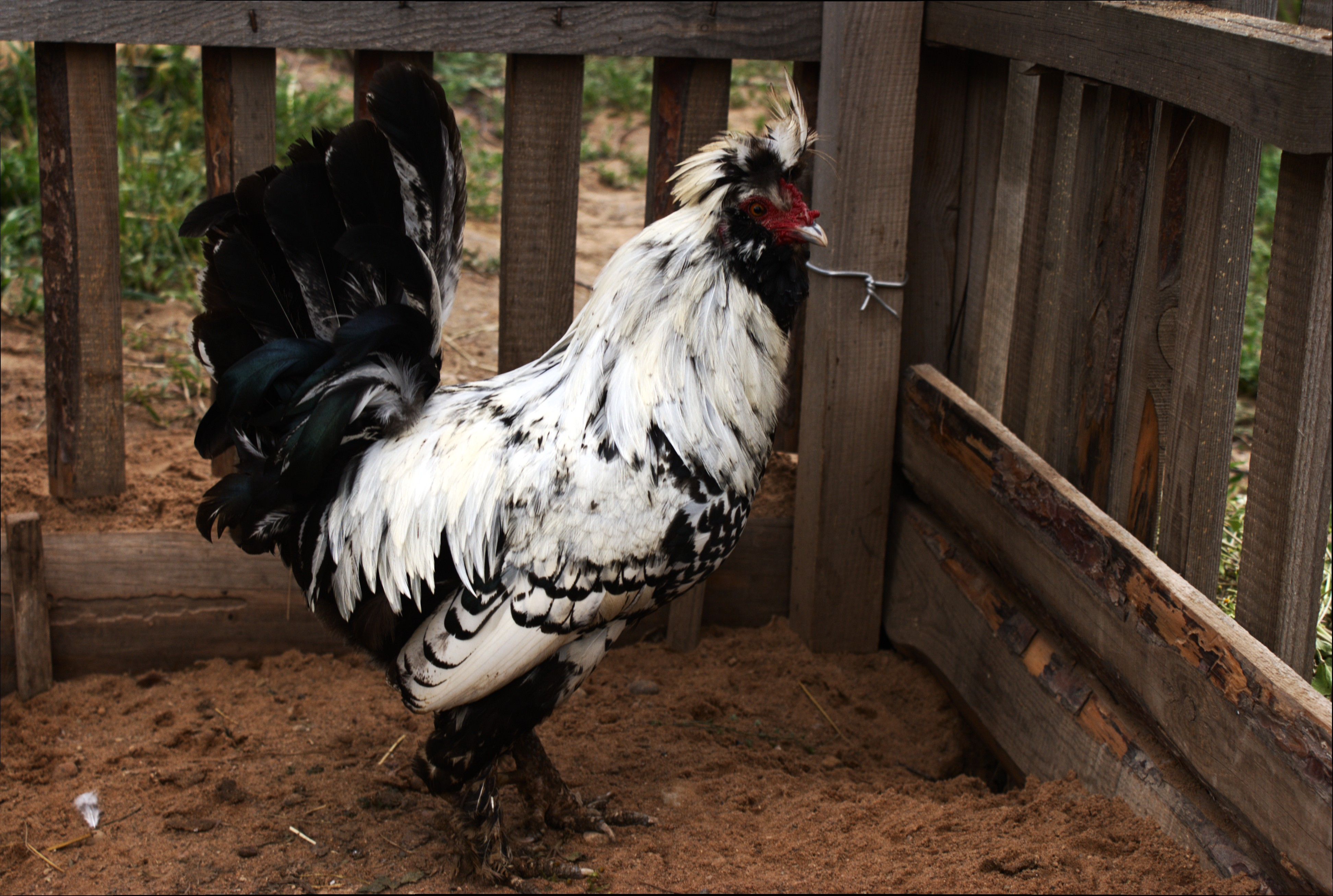 Взрослый петух Павловской породы.